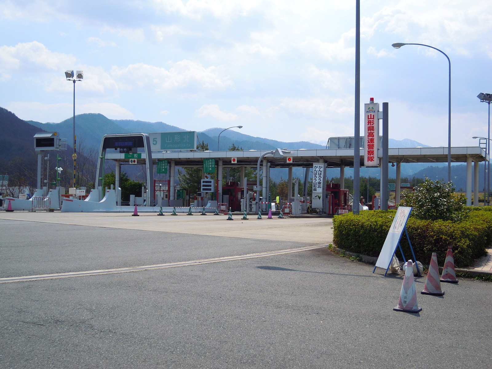 山形県山形市にある山形自動車道の山形北インターチェンジ料金所を一般道側から